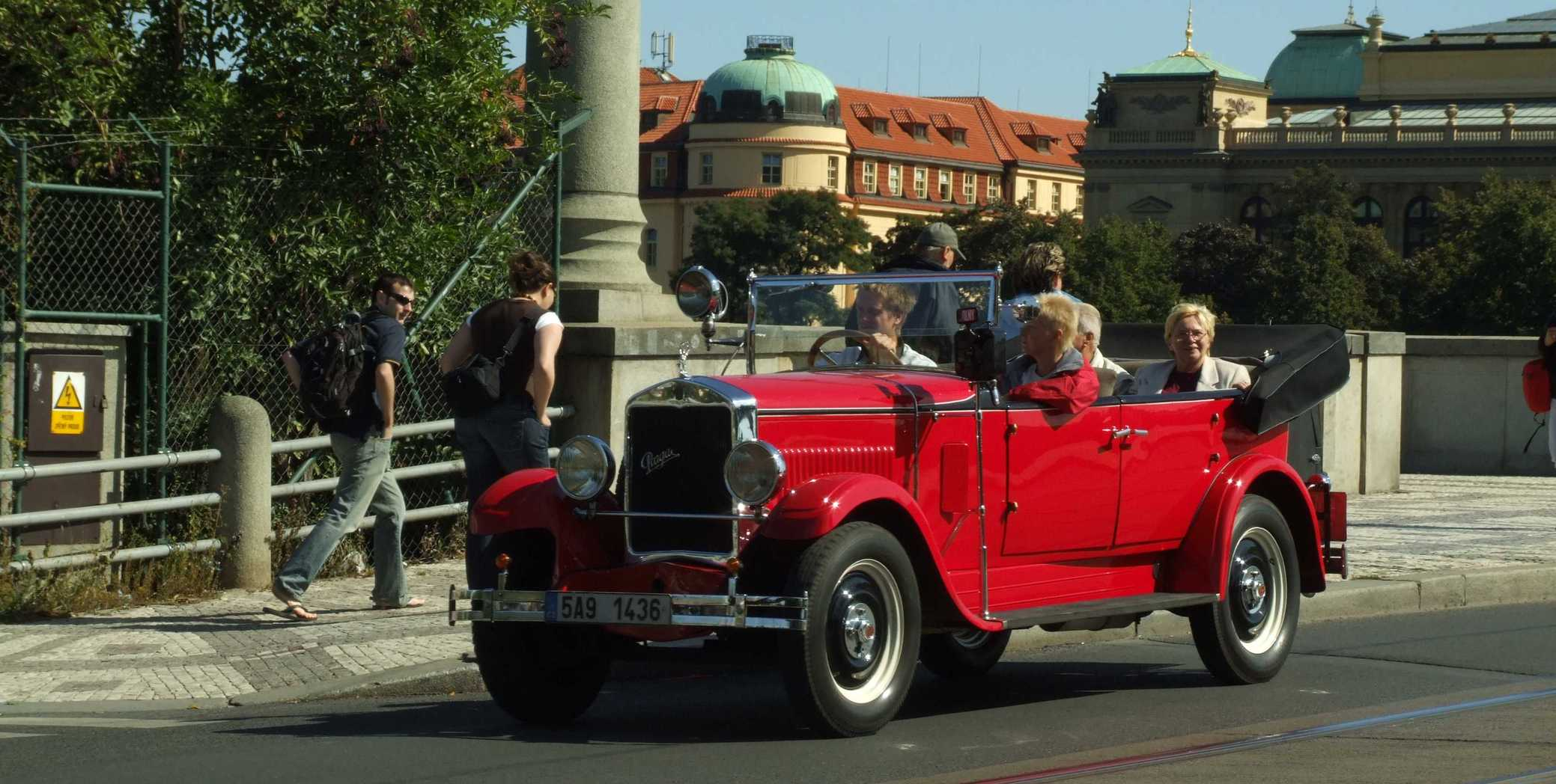 Praga Automobile 1928 "Personenkraftwagen Piccolo 4/12 PS, Alfa 6/20 PS, Mignon 11/35 PS, Grand 19/60 PS